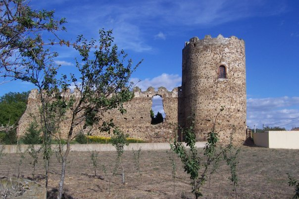 Castillo de los Bazàn (Palacios de la Valduerna, Leòn, Spain) Anualmente, el primer domingo de agosto acoge en el patio de armas la manifestaciòn cultural "Poesia para Vencejos" durante la cual se hace entrega del Premio Nacional de Poesia "Conrado Blanco". Declarado BIC en 1945.